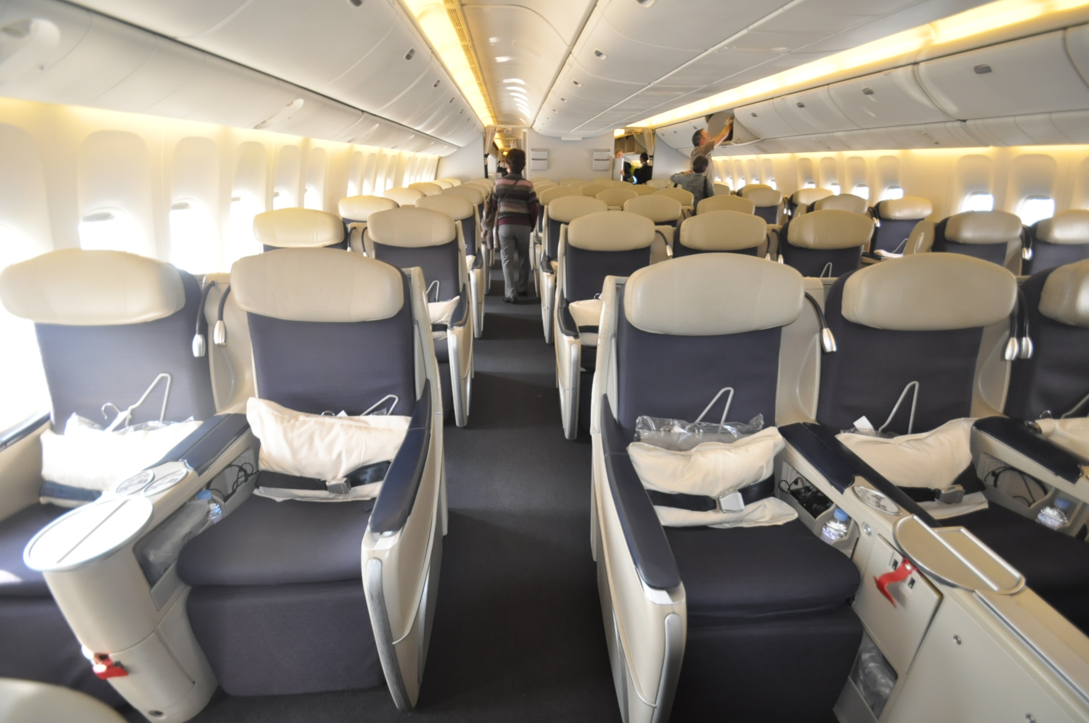 エールフランス航空ビジネスクラス（Ｂ７７７－３００ＥＲ）